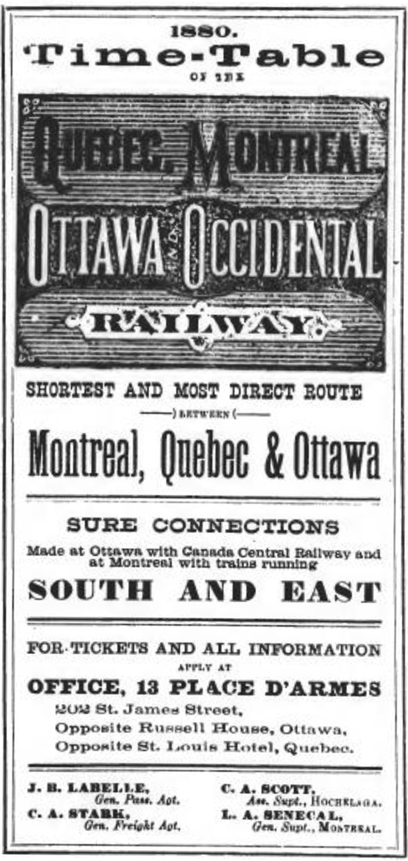 Page couverture de l'horaire des trains.